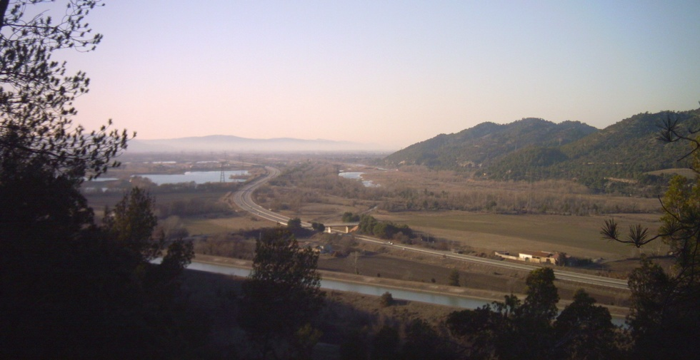 La sortie du défilé de Mirabeau, entre Vaucluse et Bouches-du-Rhône, vue en direction de l'ouest. Au premier plan, le canal EDF et l'autoroute A51 "Val de Durance".